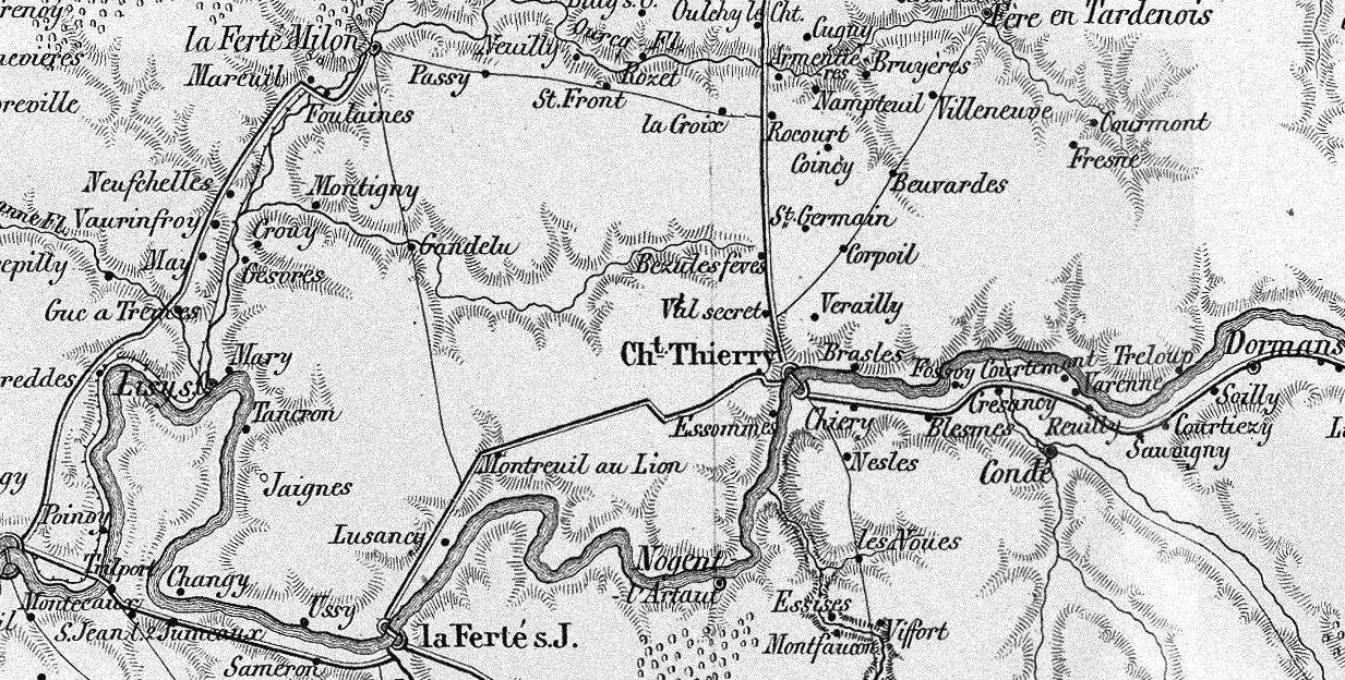 Karte der Region des Ourcq in Frankreich